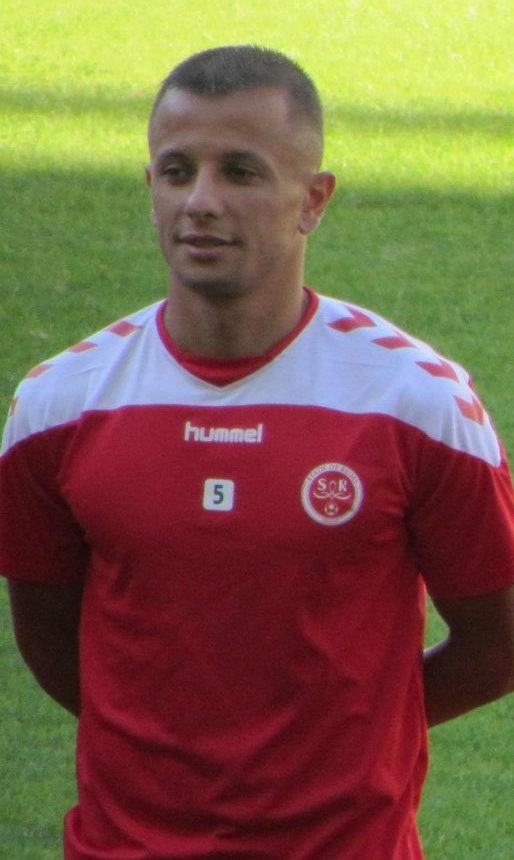 Kamel Ghilas.